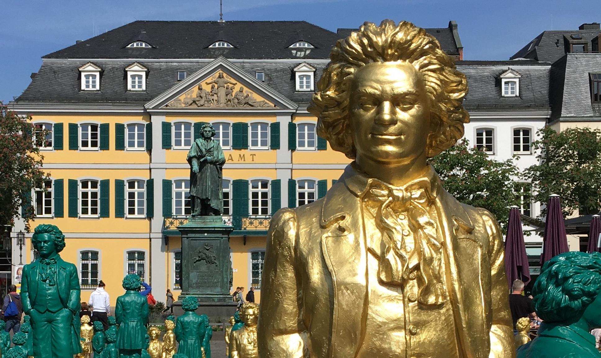 Deutschland, Bonn, Münsterplatz: Beethoven-Denkmal vor der alten Hauptpost. Davor sind ca. 700 grüne und goldene Beethovenfiguren aus Kunststoff aufgestellt; eine Aktion des Konzept-Künstlers Ottmar Hörl.